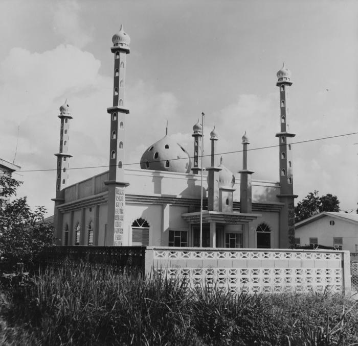 Negatief. Moskee van SIV aan het Pad van Wanica, voor het eerst gebouwd als houten moskee in 1934. Vanaf 1958 werd het houten gebouw vervangen door een stenen moskee, ontworpen door Heinrich Wladimir Mohamed Radja (d. 1976). Ook de kalligrafieen aan weerszijden van moskee waren van zijn hand. Het Pad van Wanica heet tegenwoordig de Indira Gandhiweg en is de verbindingsweg tussen Paramaribo en de Johan Adolf Pengel Luchthaven (vroeger geheten Zanderij).. Moskee van de Ahmadiyya beweging langs het Pad van Wanica